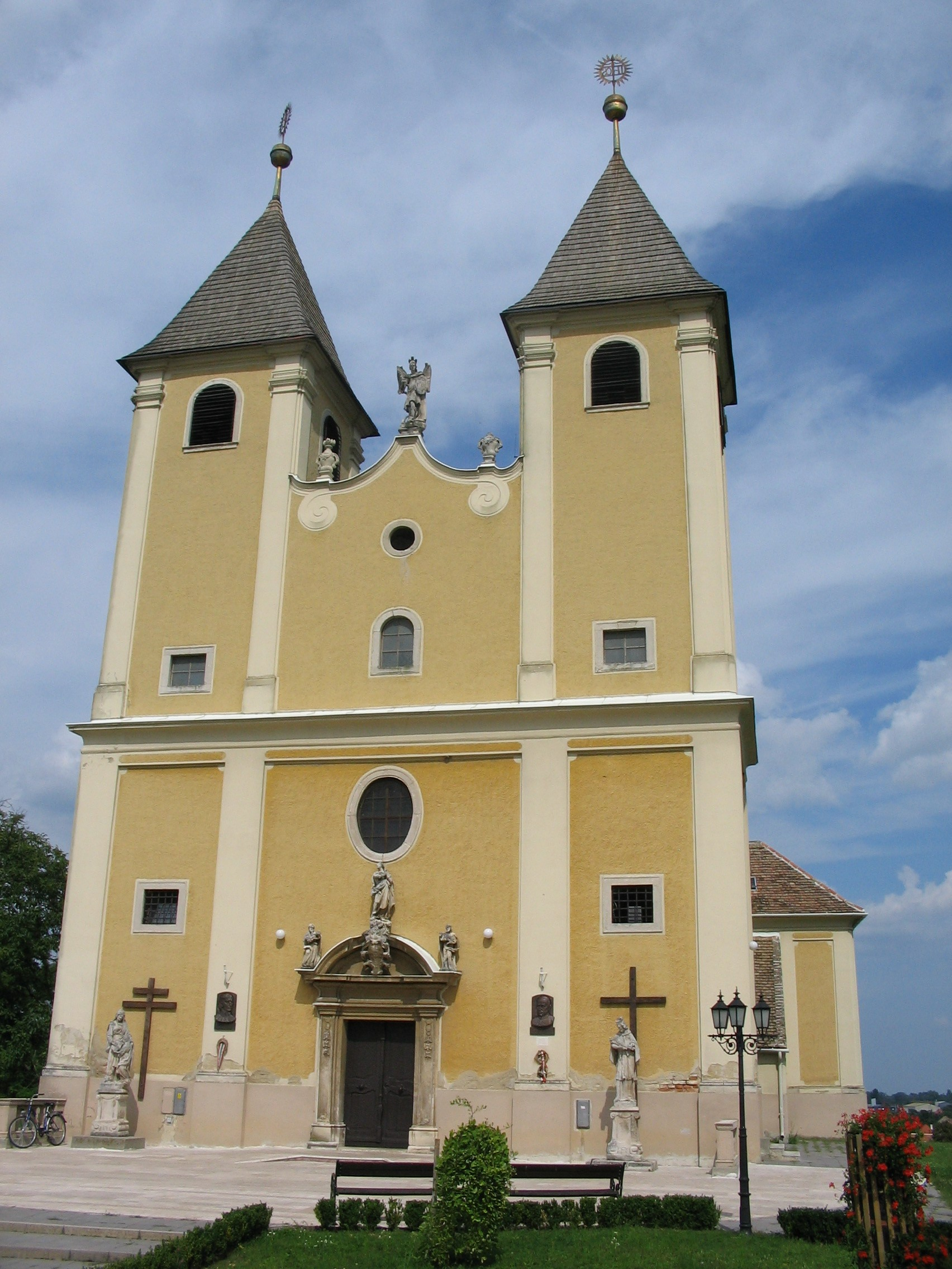 A fertőszéplaki római katolikus templom Széchenyi Ferenc és Mindszenty József dombormívű emléktábláival